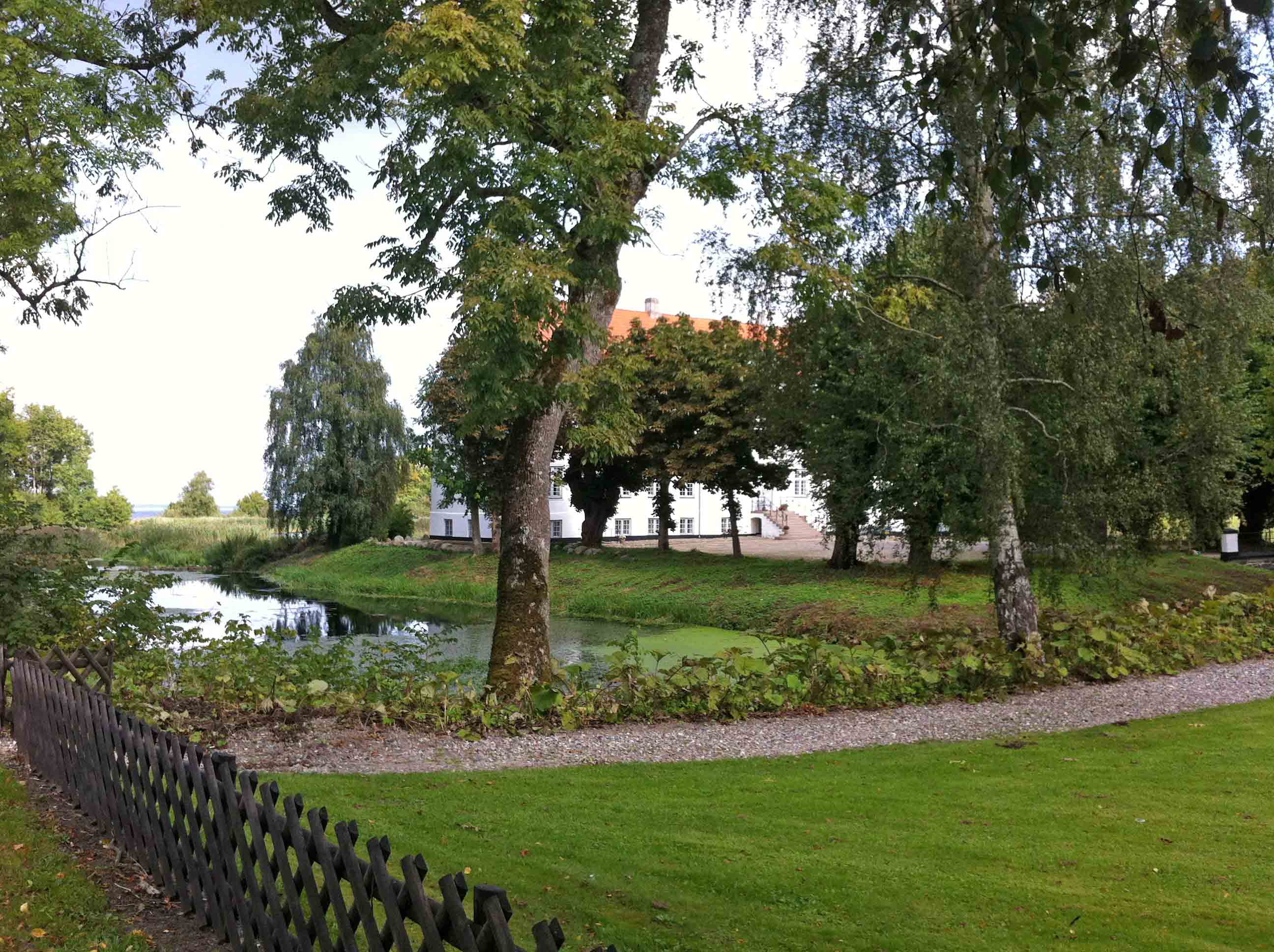 Lundbæk Landbrugsskole fra sydvest